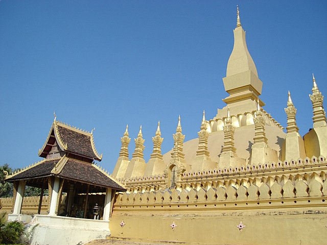 Pha That Luang,Laos